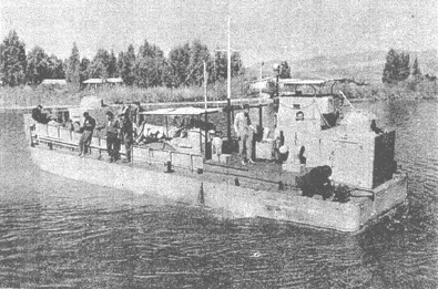 נחתת משמר בחוף המערבי של הכנרת